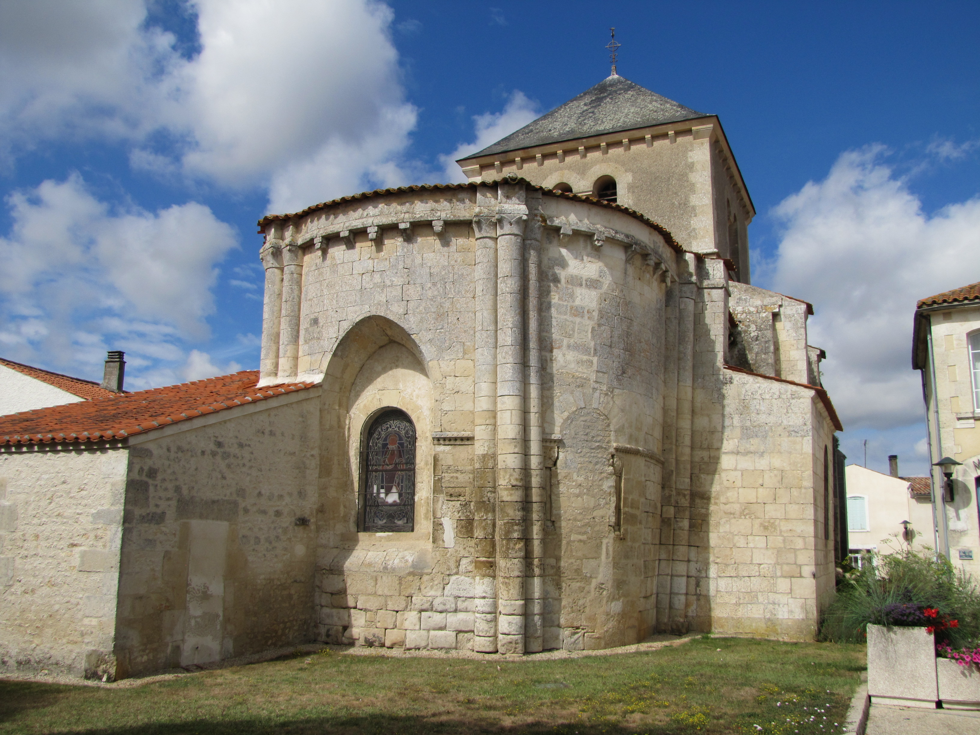 Église Saint-Jean-Baptiste de Velluire